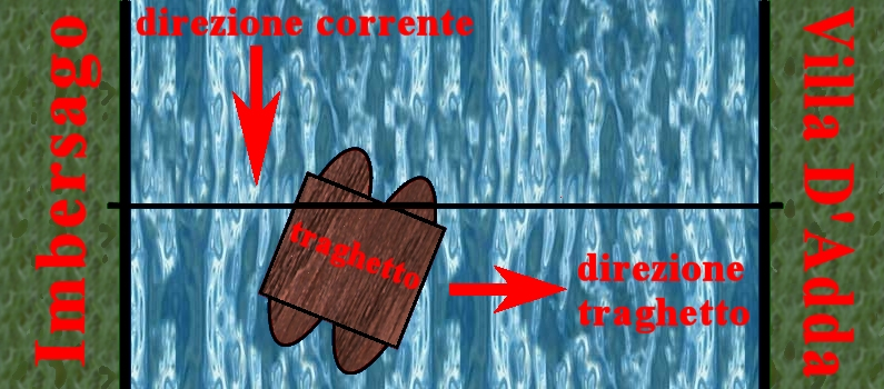 Schema del funzionamento del traghetto a mano di Leonardo da Vinci